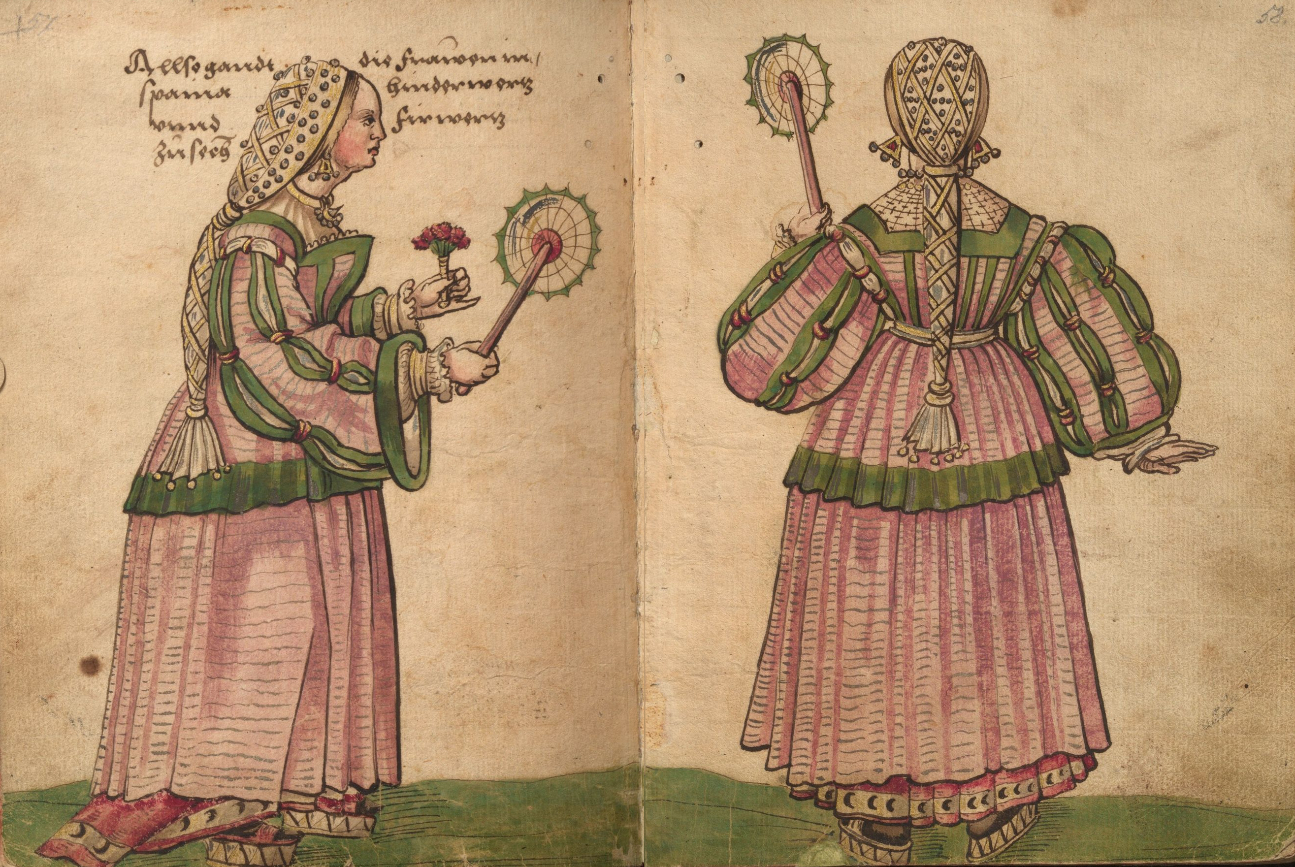 "Trachtenbuch" des Christoph Weiditz, Germanisches Nationalmuseum Nürnberg, Hs. 22474. Bl. 57-58 Tracht der vornehmen spanischen Frauen